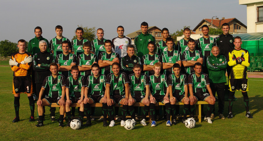 Нефтохимик 2009/2010